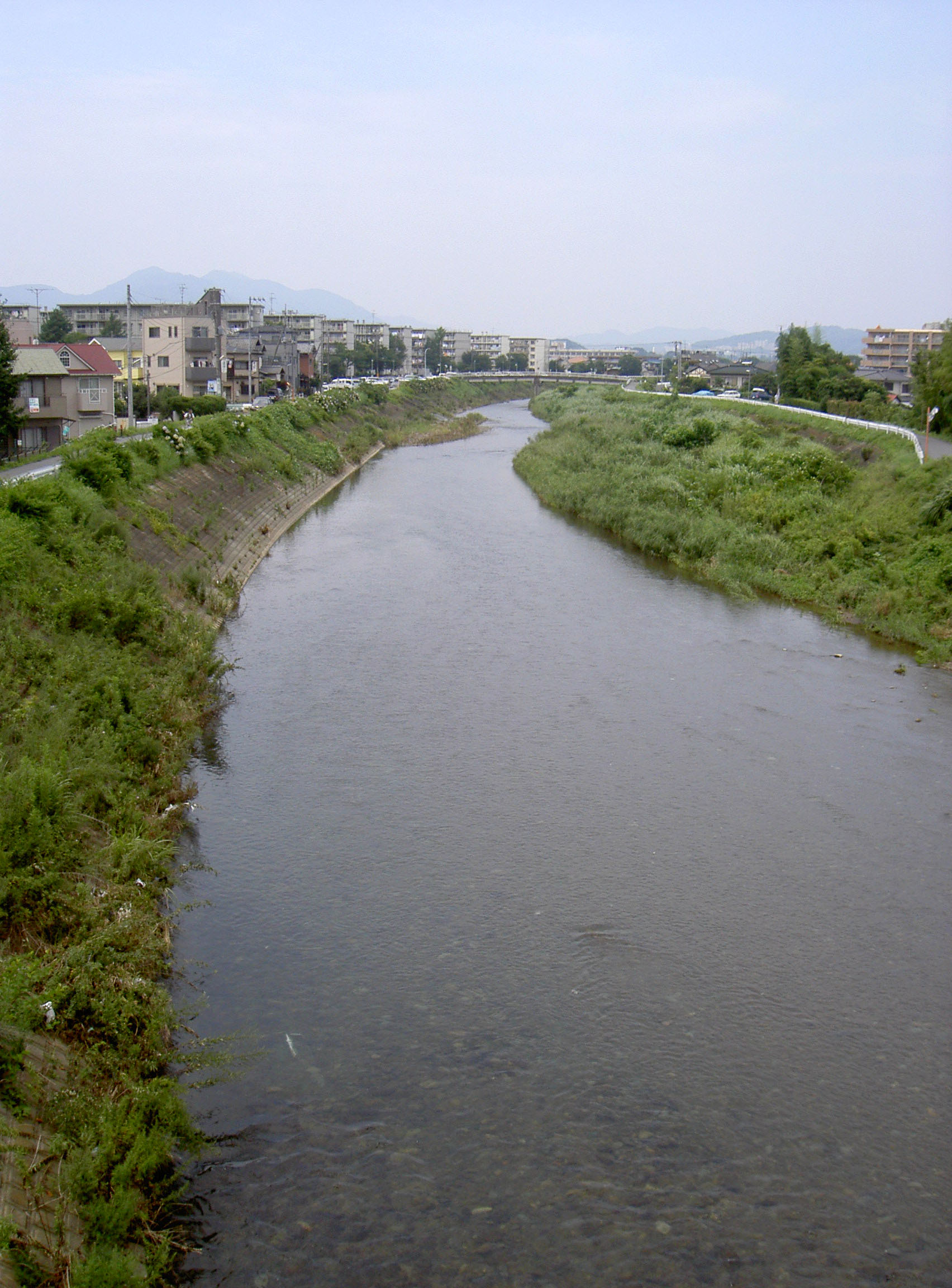 Koayu river, Atsugi-city, Kanagawa, Japan. ja: 小鮎川